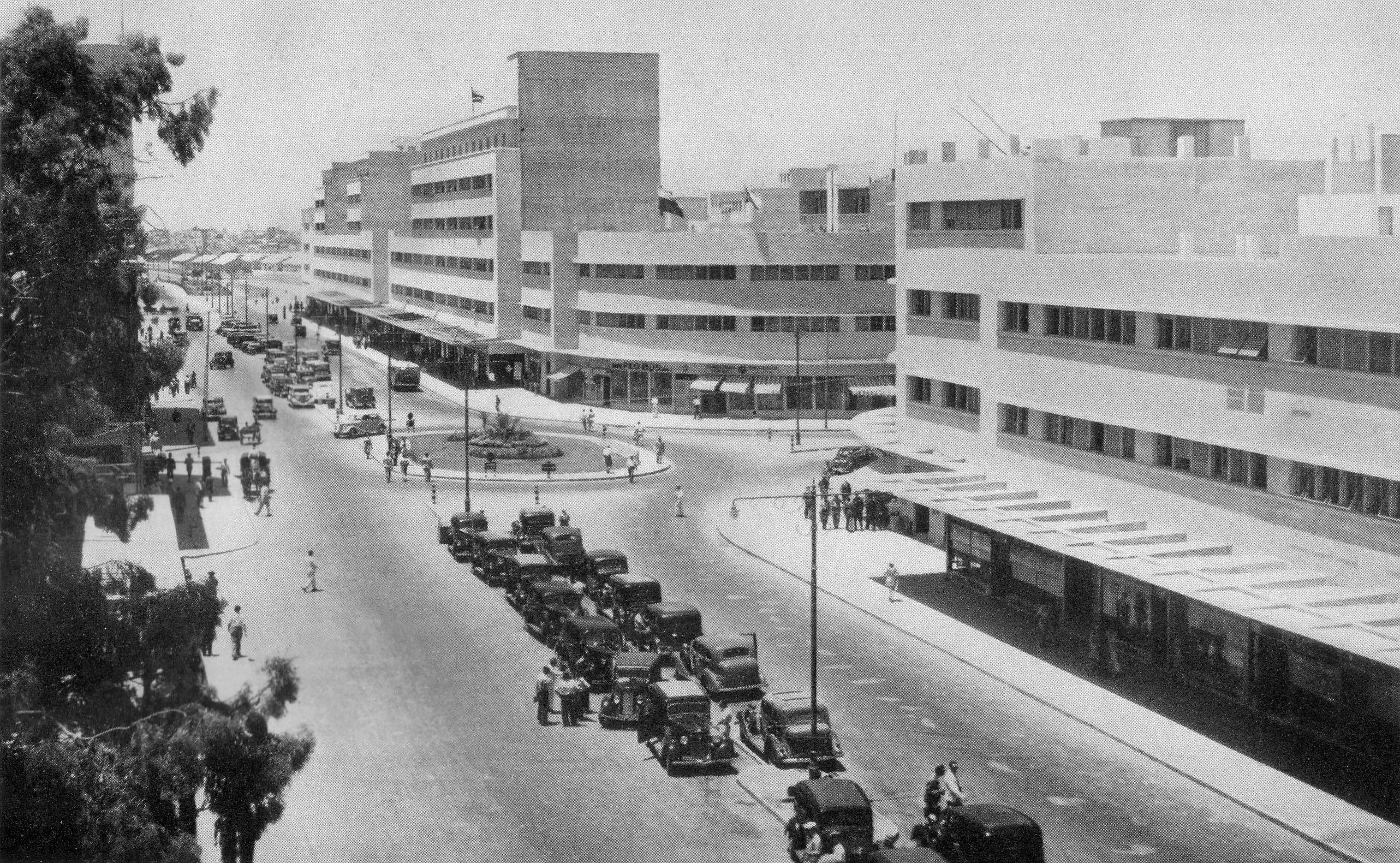 חיפה, דרך המלכים, 1938 (כיום דרך העצמאות)